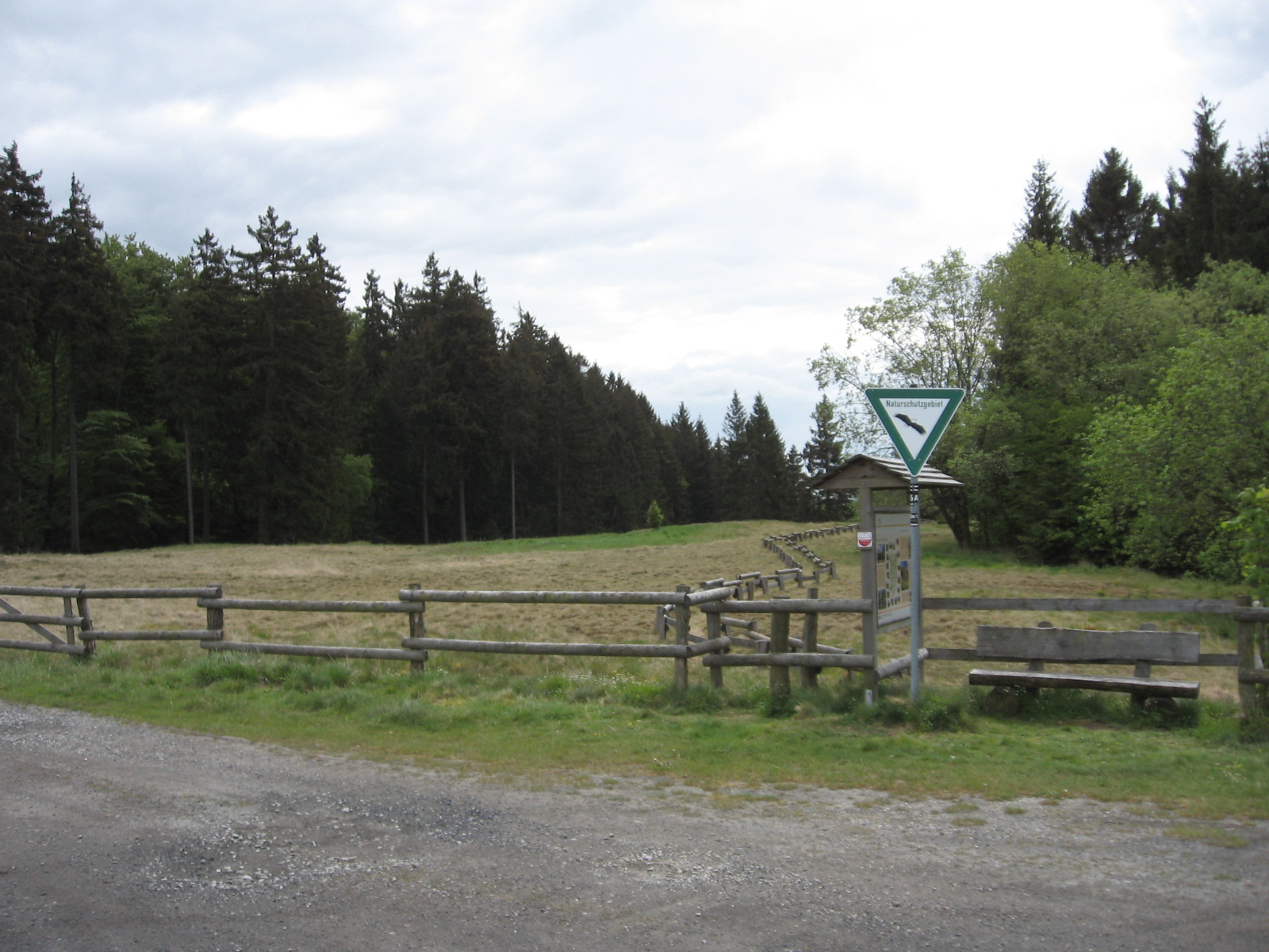 Naturschutzgebiet „Bleikuhlen und Wäschebachtal“ mit abgezäuntem Weg, Bereiche rechts des Weges gehören zum Naturschutzgebiet „Bleikuhlen“ im Stadtgebiet Marsberg